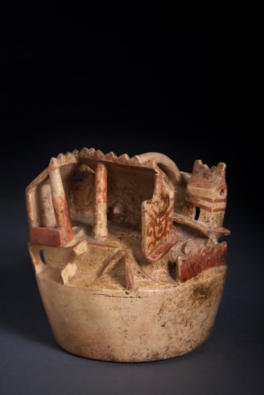 Bottiglia con ansa a staffa. Sulla camera della bottiglia è raffigurato un complesso di edifici, probabilmente rituali. Nel complesso cerimoniale sono rappresentate tre tipologie di edifici diversi: un edificio a tre pareti solide con tetto a spiovente, un edificio a tre pareti con entrata frontale e due tetti a spiovente accoppiati, e un edificio chiuso con tetto a due acque. Gli ultimi due sono frequenti nelle fasi IV e V della cronologia moche (VI/VII sec.), mentre la prima tipologia di edificio risale alla fase proto-moche (Wiersema J. 2010).